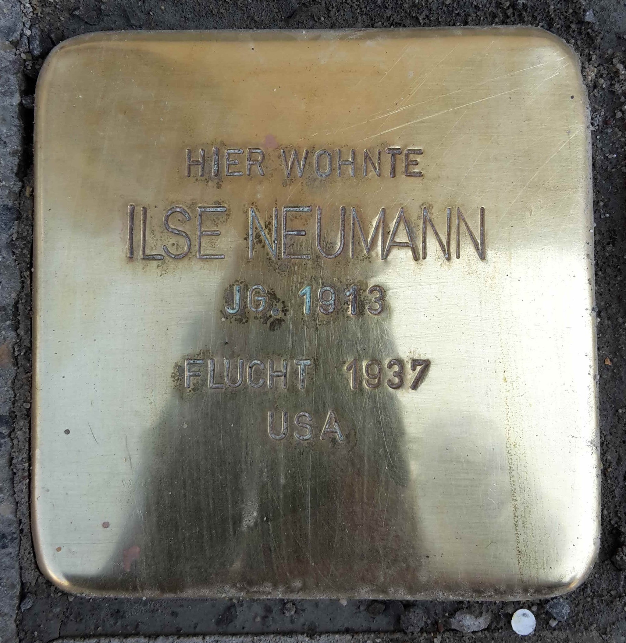 Stolperstein für Ilse Neumann in Neu-Ulm